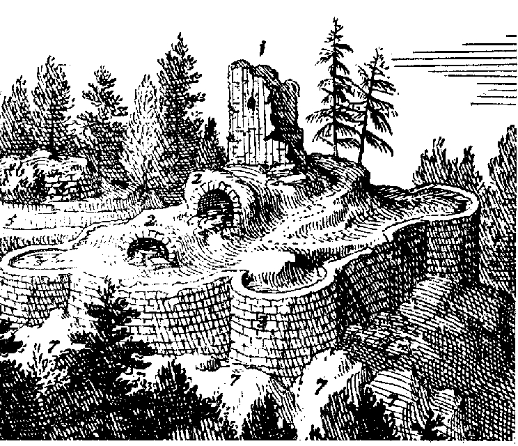 Stich von Clems Beuttler, 1673